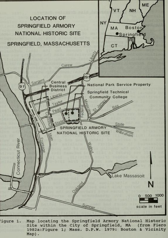 Lageplan der ehemaligen Springfield Waffenfabrik.